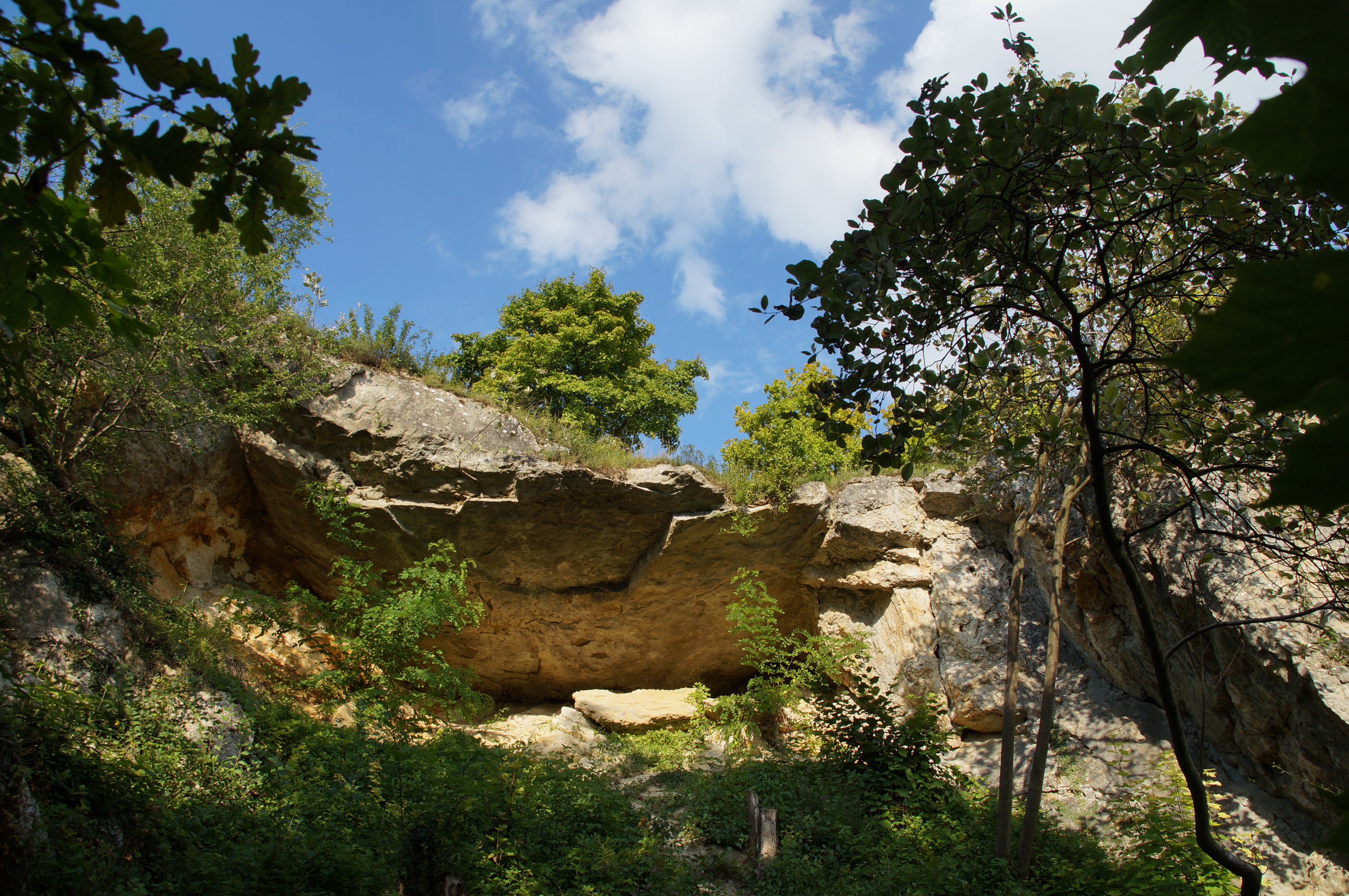 Schutzfelsen bei Pentling, Geotop-Nummer: 375R032